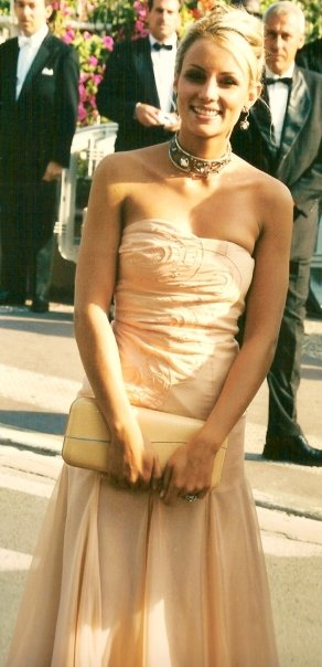 Elodie Gossuin, Miss France 2001, au festival de Cannes